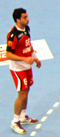 Kristianstad. Frankrike-Ägypten på Handbolls VM.